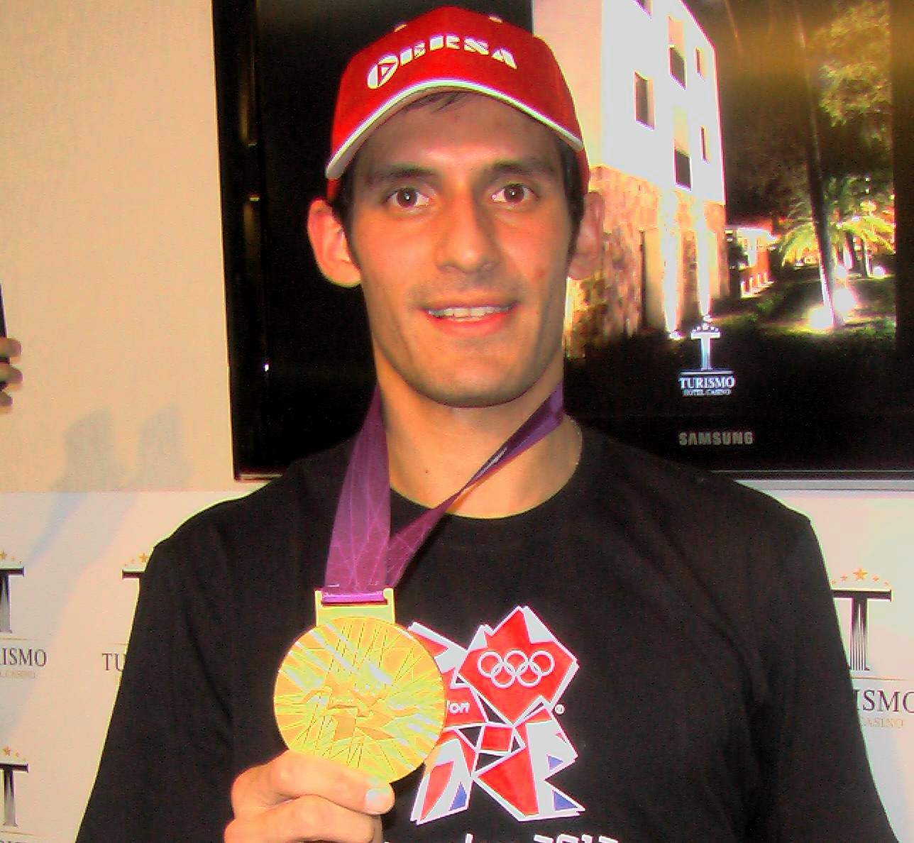 Sebastián Crismanich. Medallista olímpico argentino 2012.